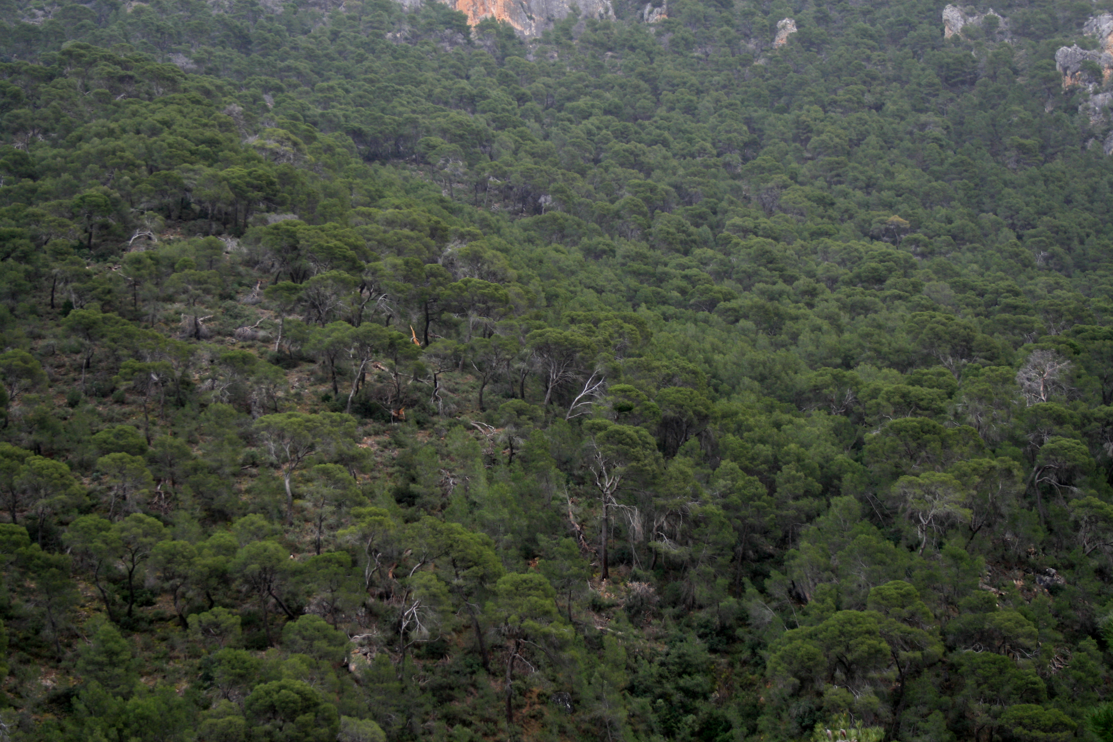 Bosque de Pino Carrasco (Pinus halepensis) en el valle del Quiebrajano (Jaén).